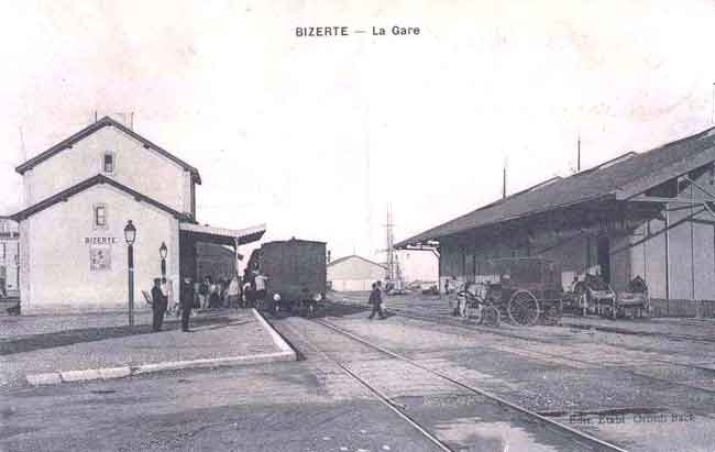 Gare ferroviaire de Bizerte